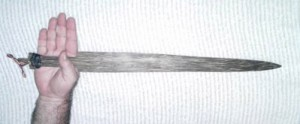 Guayka Larga.